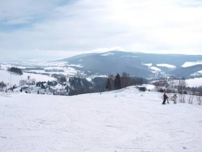 Vysoký kámen, Orlické hory